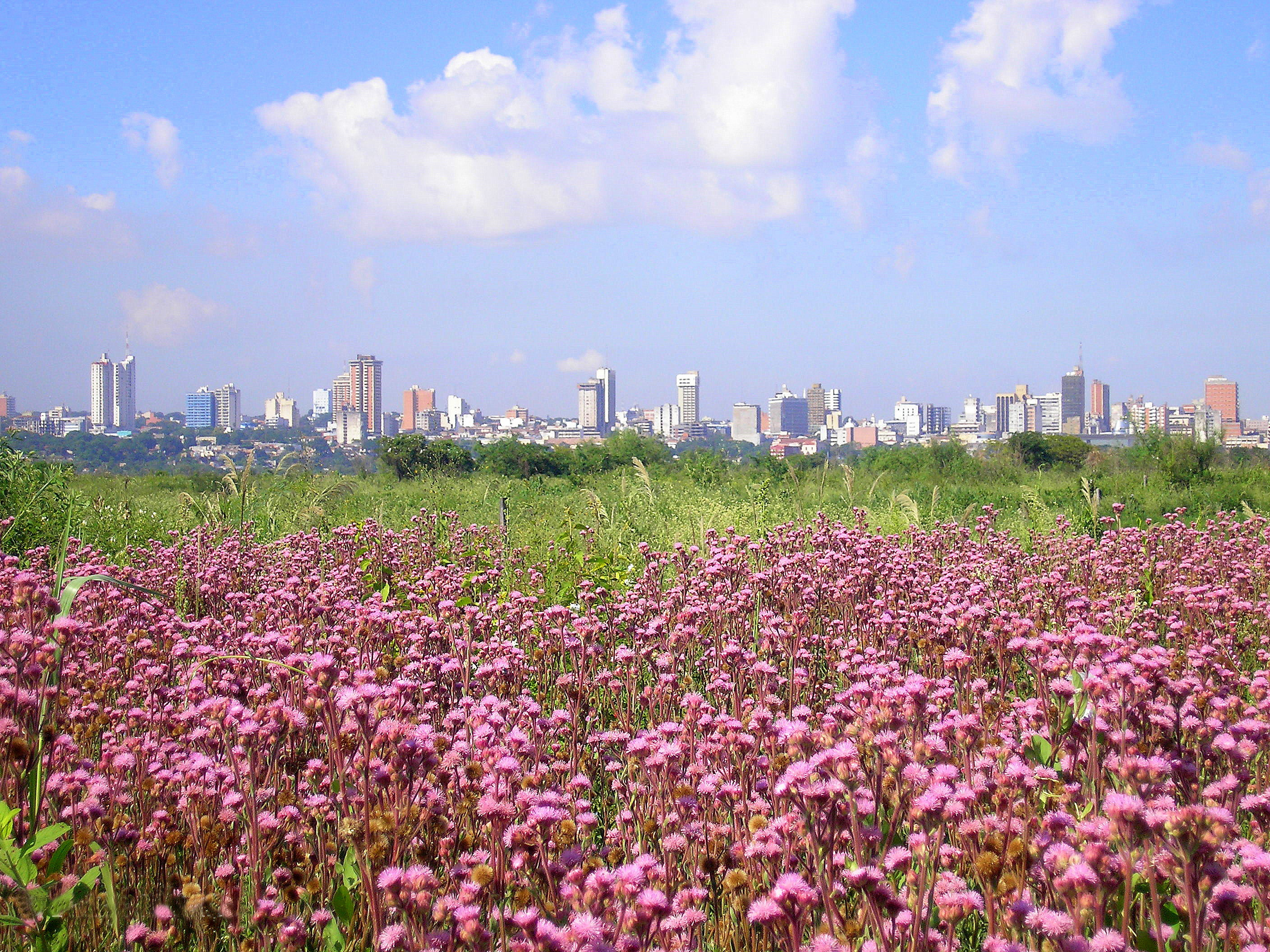 Fotografía de Asunción tomada desde la zona del Club Mbiguá, al otro lado de la Bahía de Asunción, capital de Paraguay.